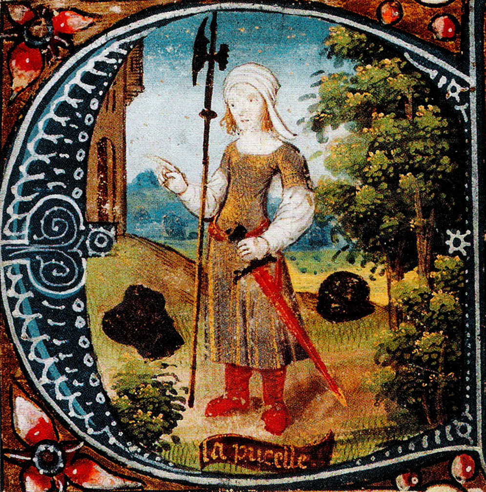 Enluminure représentant Jeanne d'Arc en habit de paysanne, tenant une hallebarde et une épée. Lettrine historiée, Paris, Bibliothèque nationale de France, ms. Latin 14665, folio 349 recto.